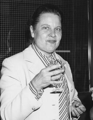 Charlotte Erickson